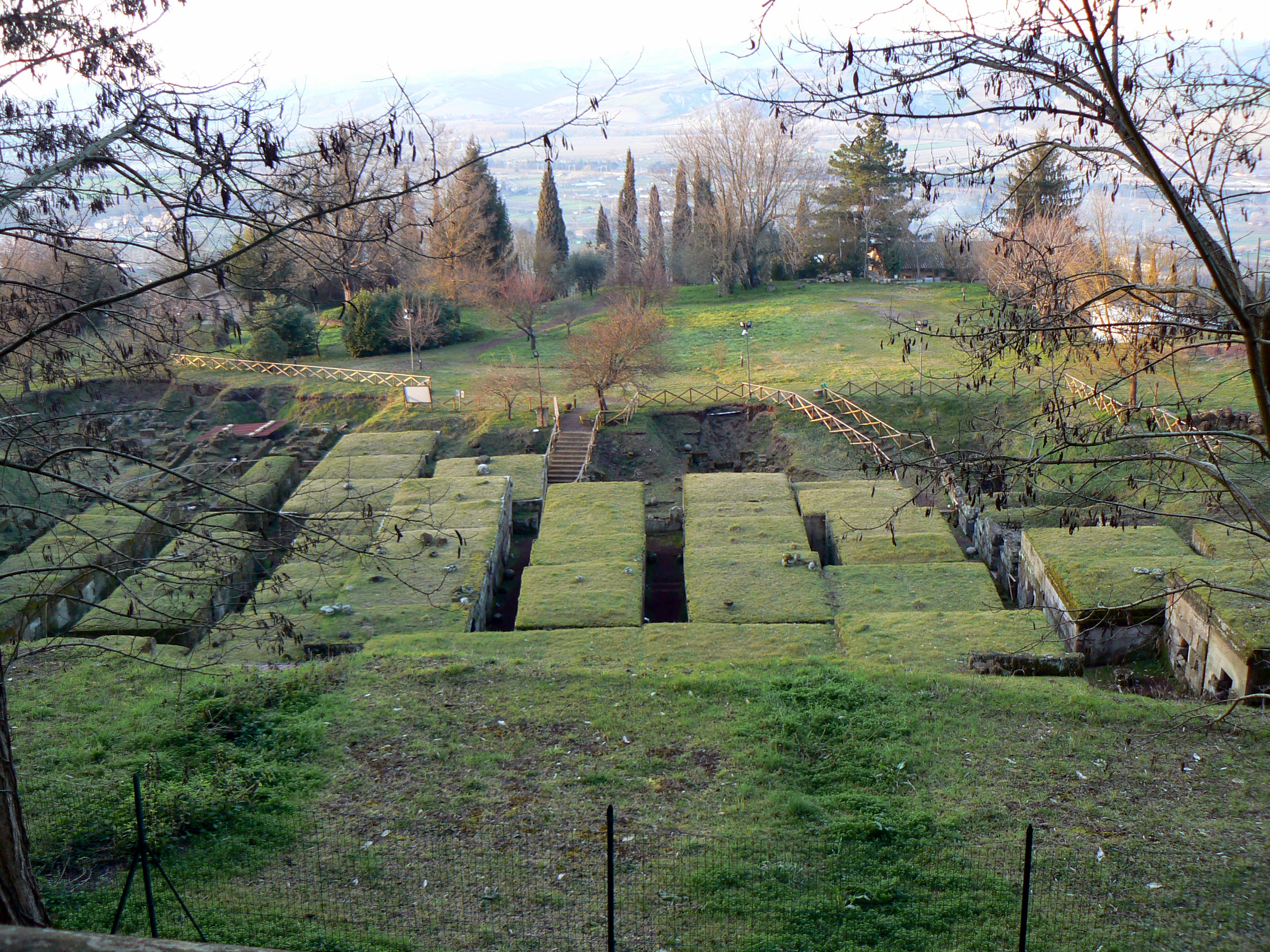 Necropoli Etrusca "Crocifisso del Tufo" - MIBAC This is a photo of a monument which is part of cultural heritage of Italy.